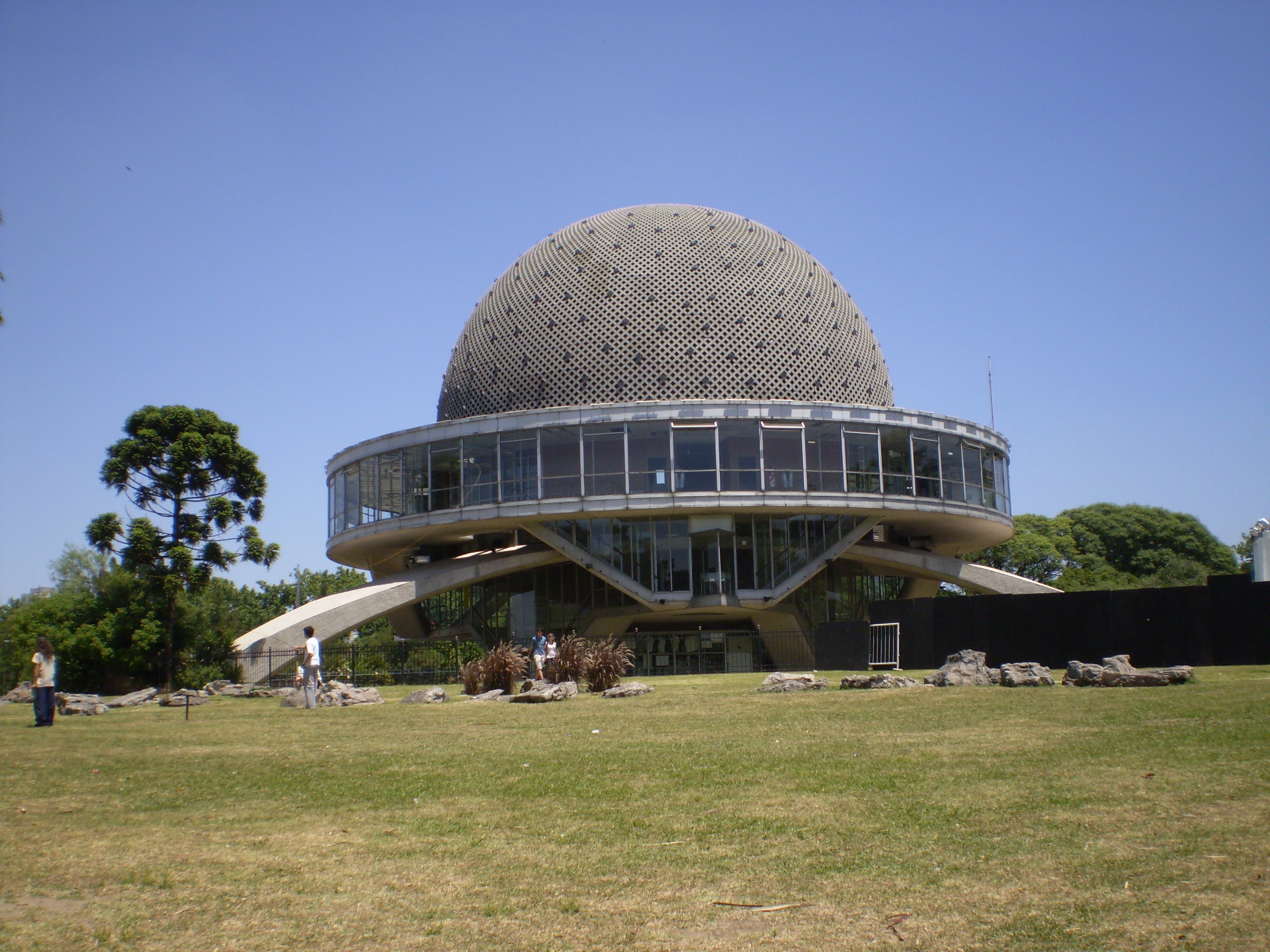 Planetario de la ciudad de Buenos Aires, Argentina